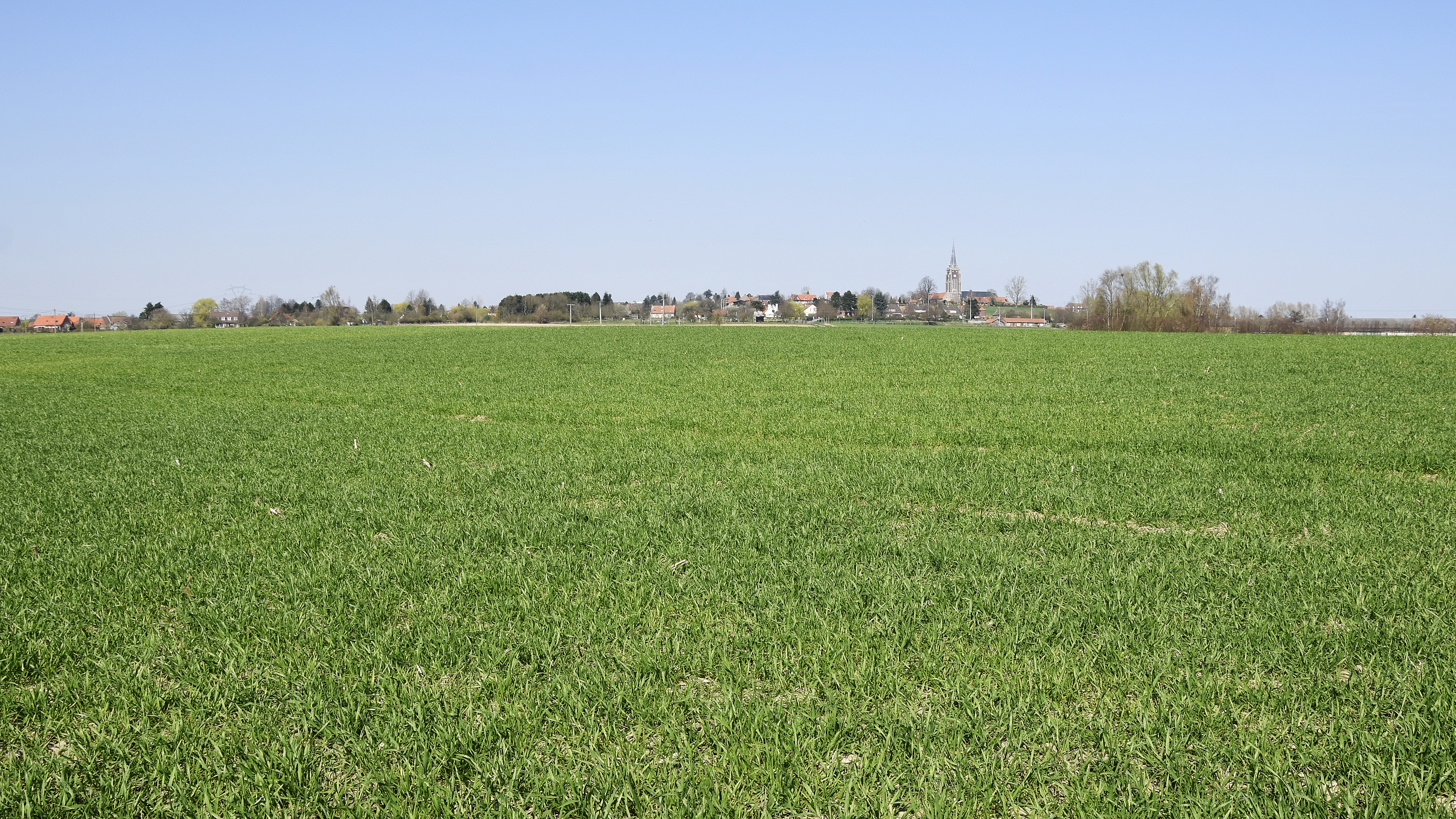 Mons-en-Pévèle - champ de bataille de 1304, vue vers le nord